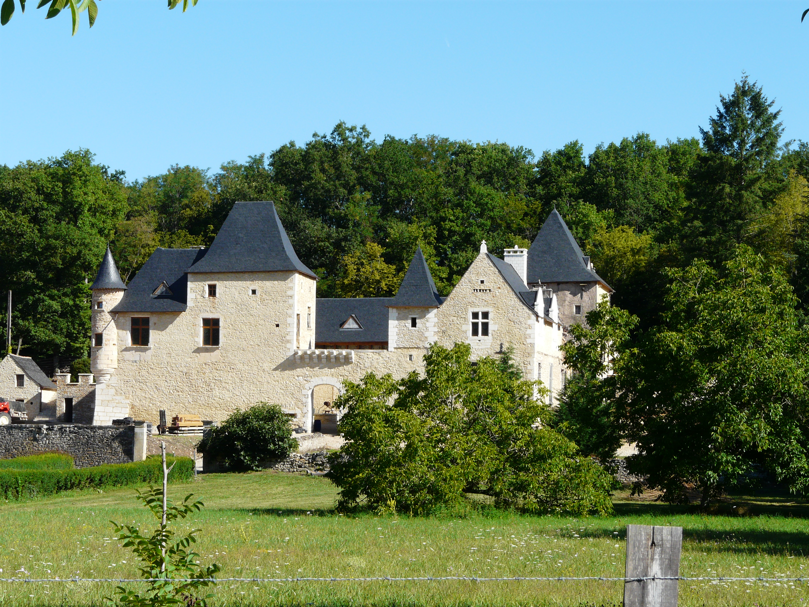 Le château de la Petite Filolie, Condat-sur-Vézère, Dordogne, France